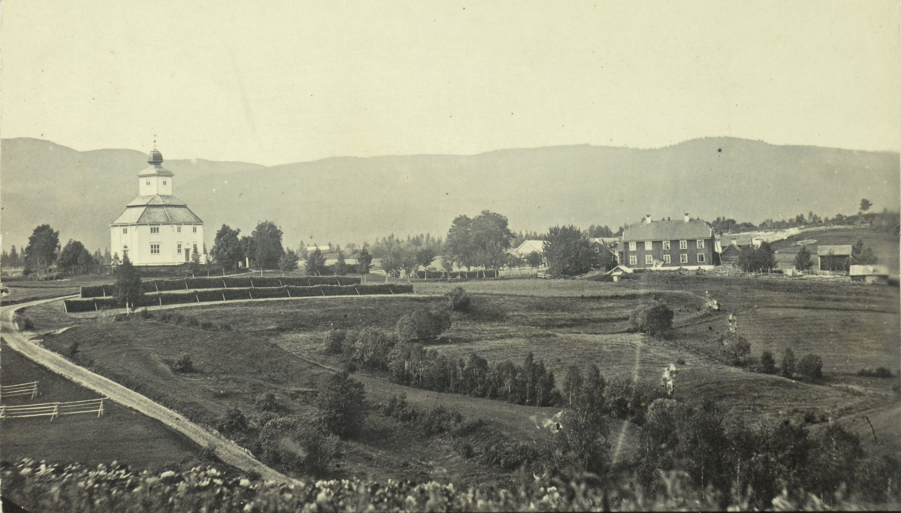 Parti fra Klæbu. Kirken til venstre, med prestegården til høyre.